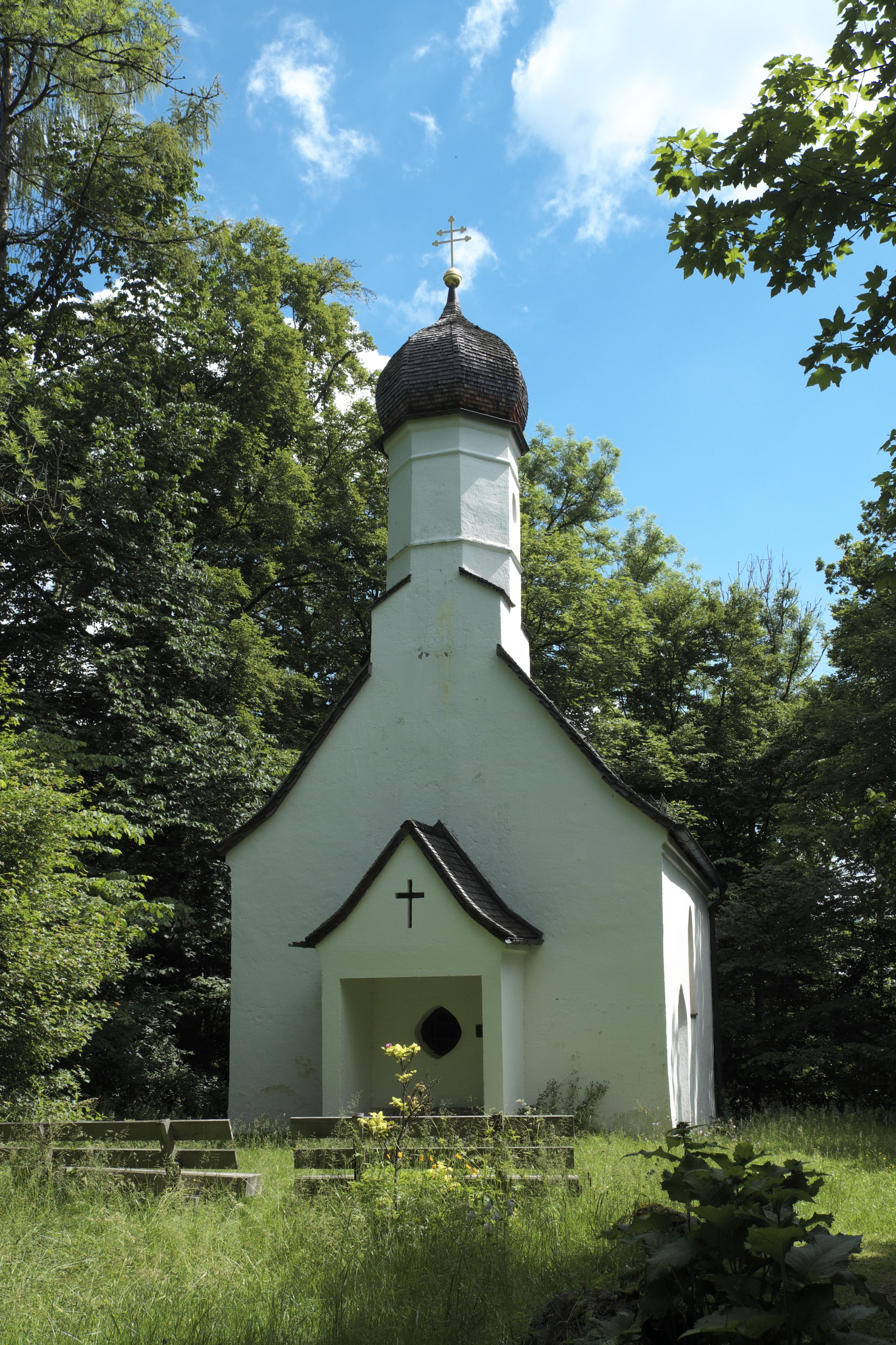 Katholische Filialkirche St. Ulrich in Königswiesen (Gauting) im Landkreis Starnberg (Bayern, Deutschland)